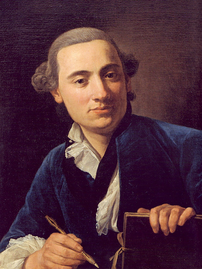 Selbstbildnis als Zeichner